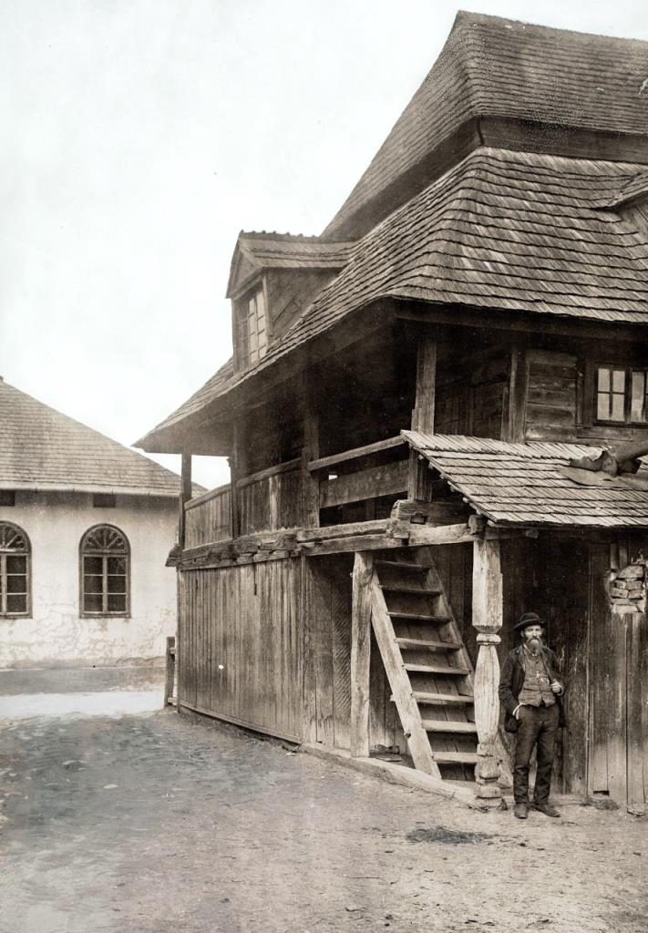 Дерев'яна синагога в Печеніжині, побудована в кінці XVIII ст., знищена в 1-й світовій війні.